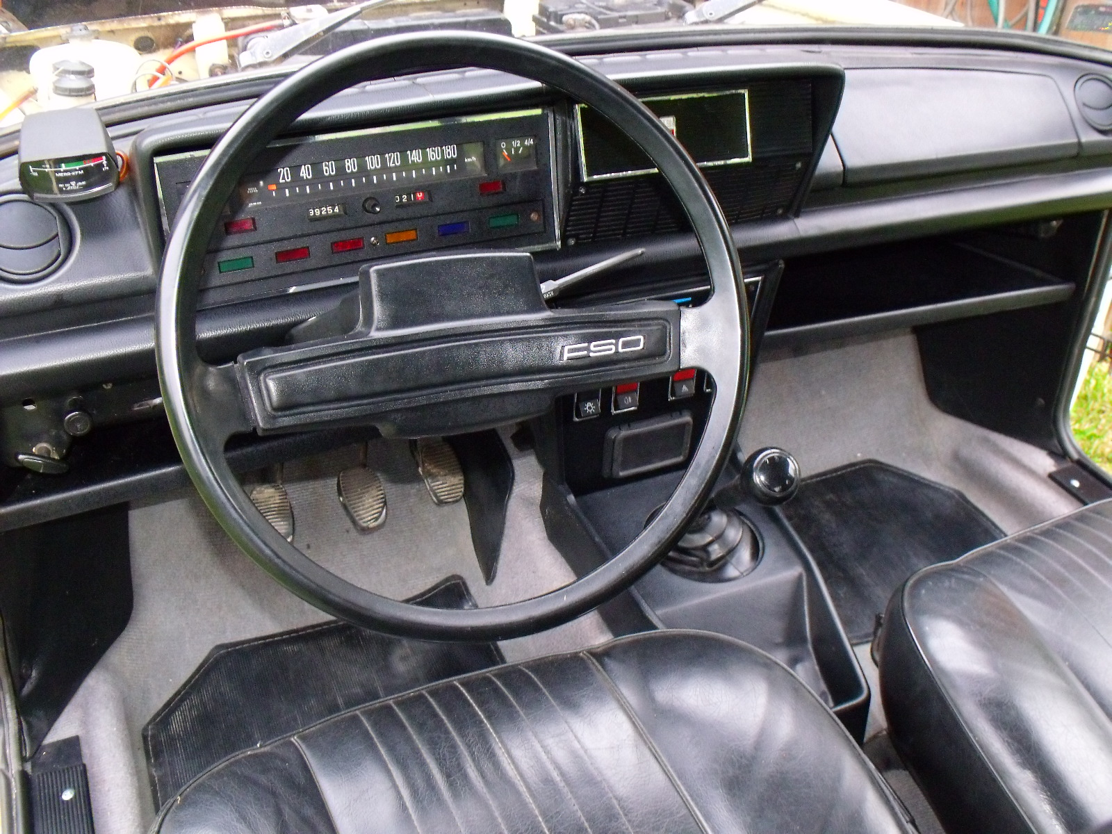 Deska rozdzielcza FSO 125p 1.5 C z roku 1985.